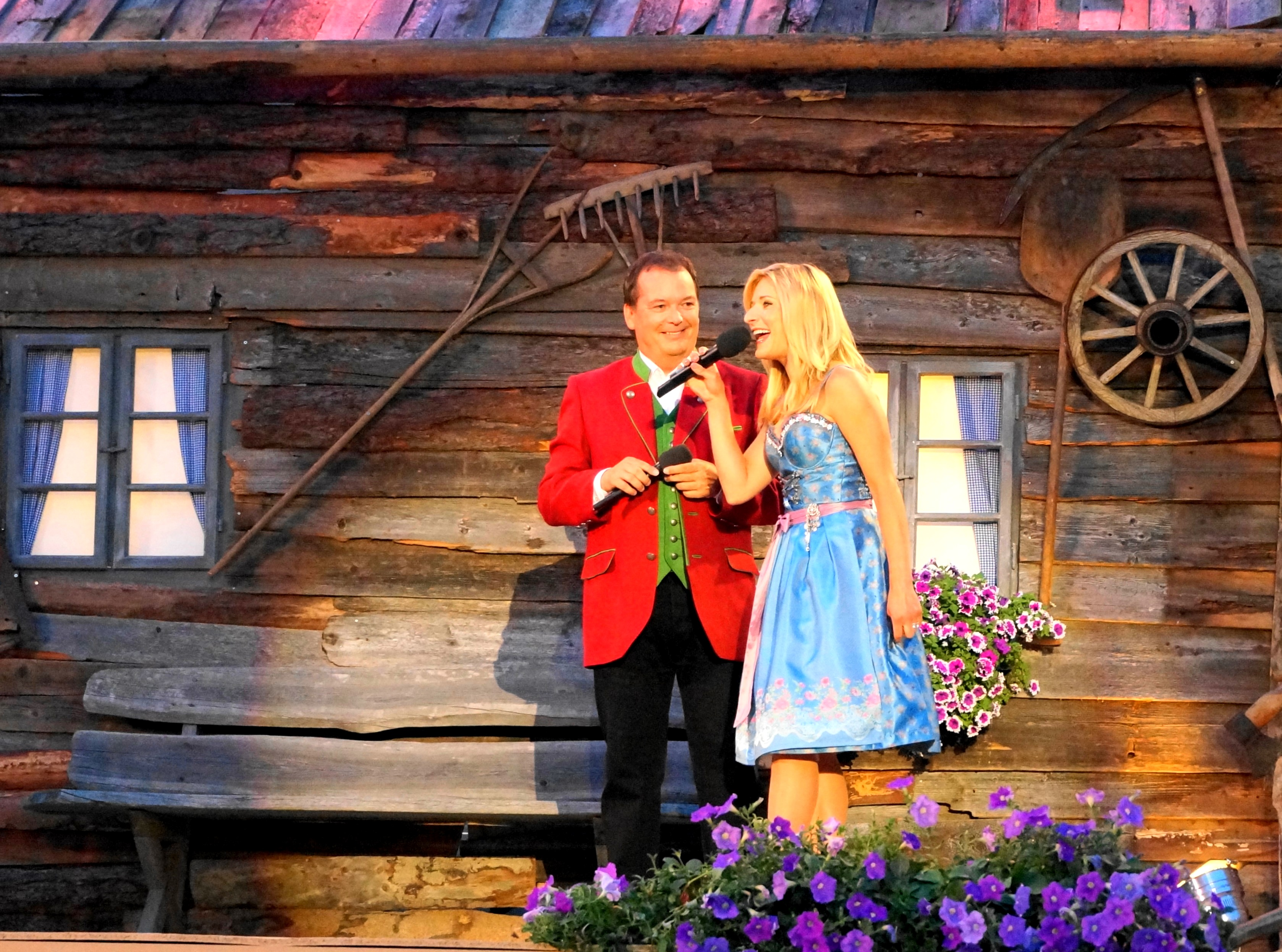 2015 Sommer Musi Open Air Schlager Festival "Wenn die Musi spielt" in den Nockbergen, Bad Kleinkirchheim, Kärnten, Österreich mit den Moderatoren Stefanie Hertel und Arnulf Prasch.